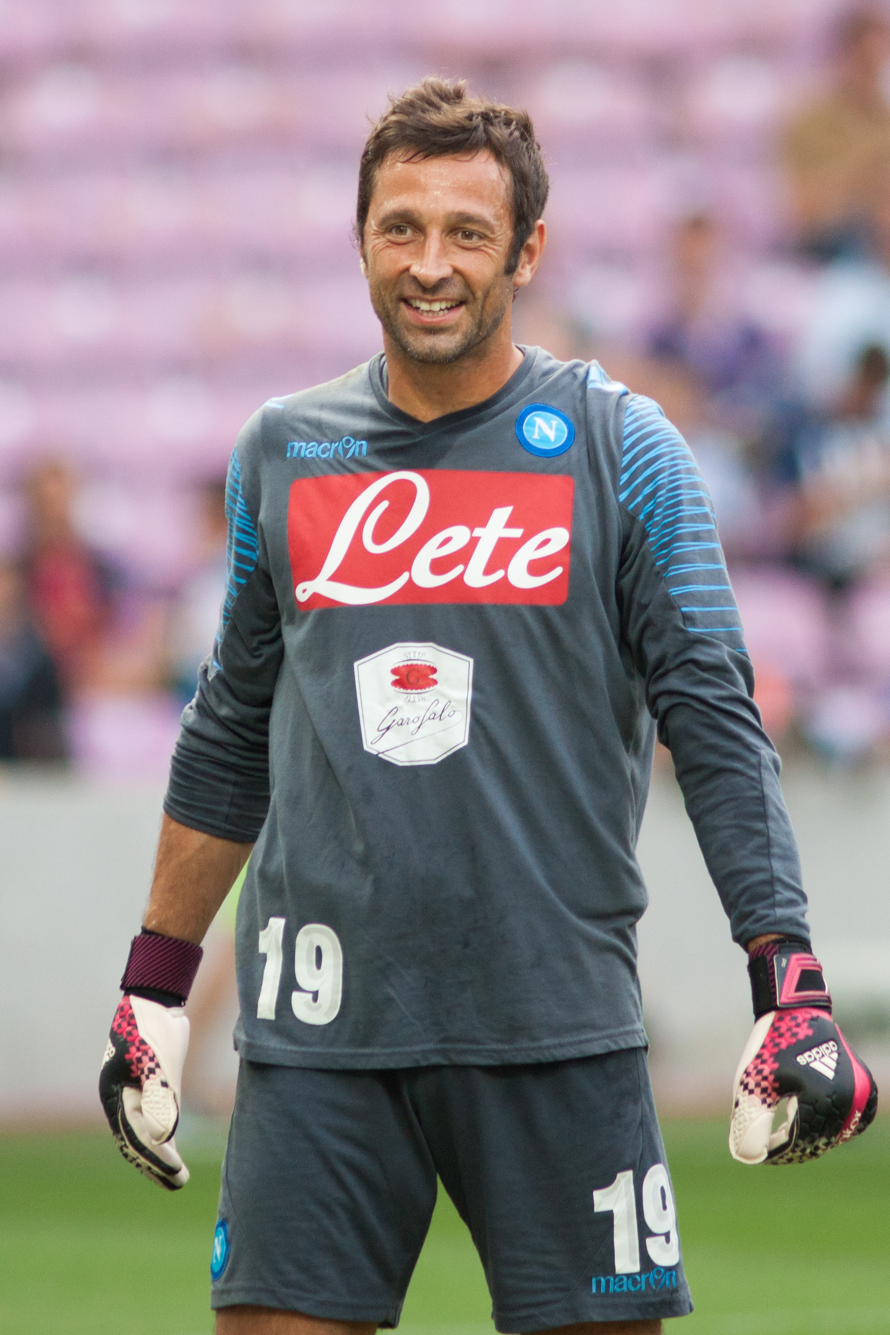 Naples vs Barcelone - Genève - aout 2014 - Roberto Colombo